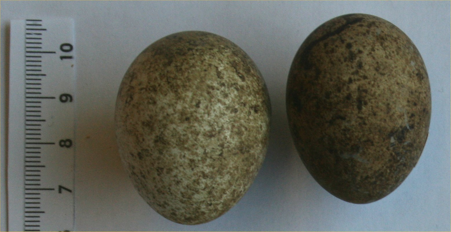 Ampuhaukan munat, V.Vuorisalon ja Y. Karran kokoelmasta, lahjoitettu 20.1.1947 Kokemäen Yhteiskoululle, munat poimittu Keravalla 1.7.1928